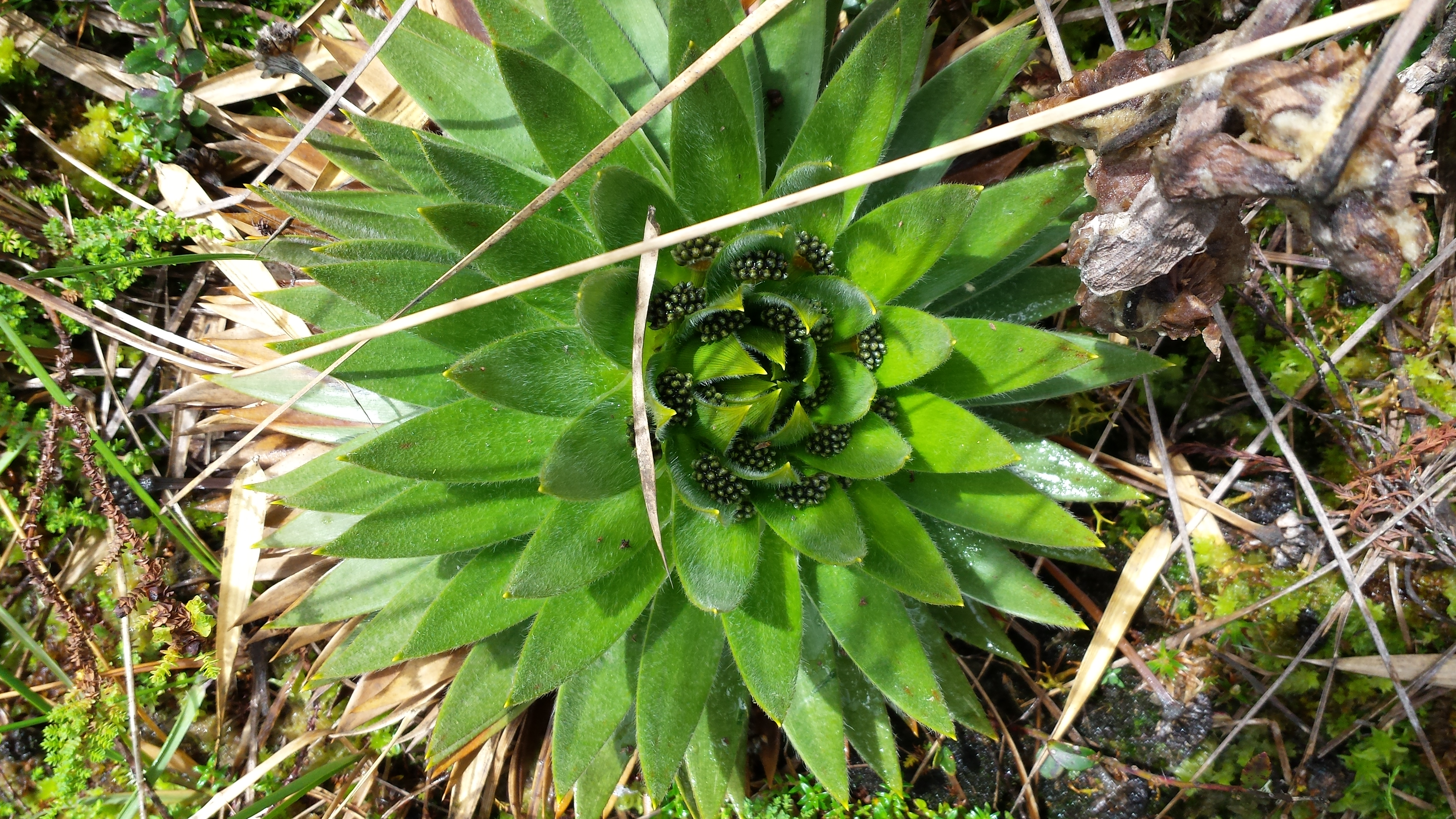 Cardita (Paepalanthus columbiensis), Páramo de Guasca, Colombia.